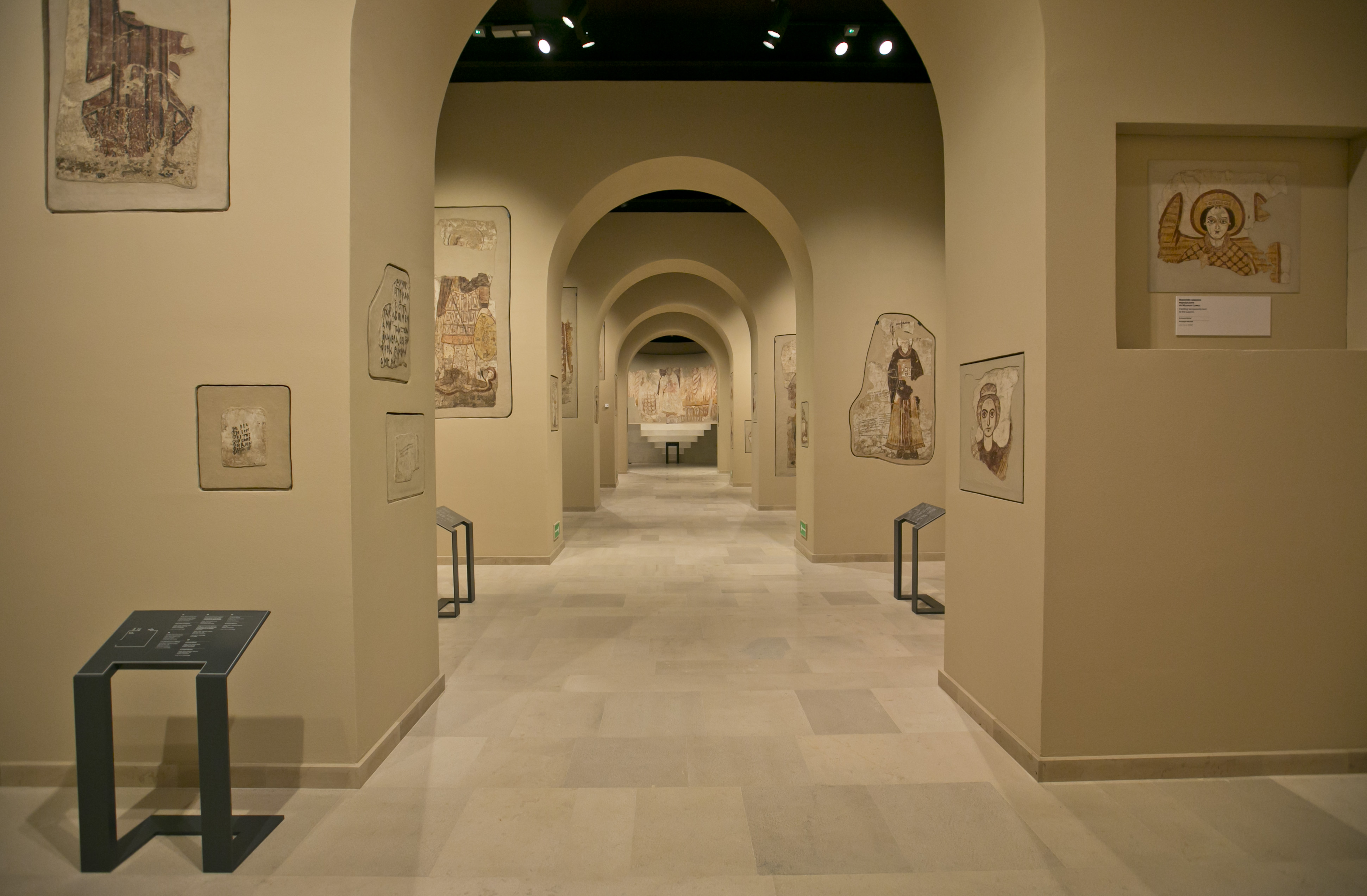 Muzeum Narodowe w Warszawie, Galeria Faras